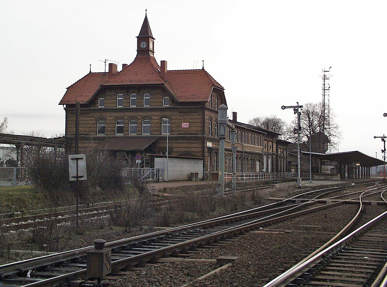 Bahnhof Güsten in Sachsen-Anhalt, Deutschland.